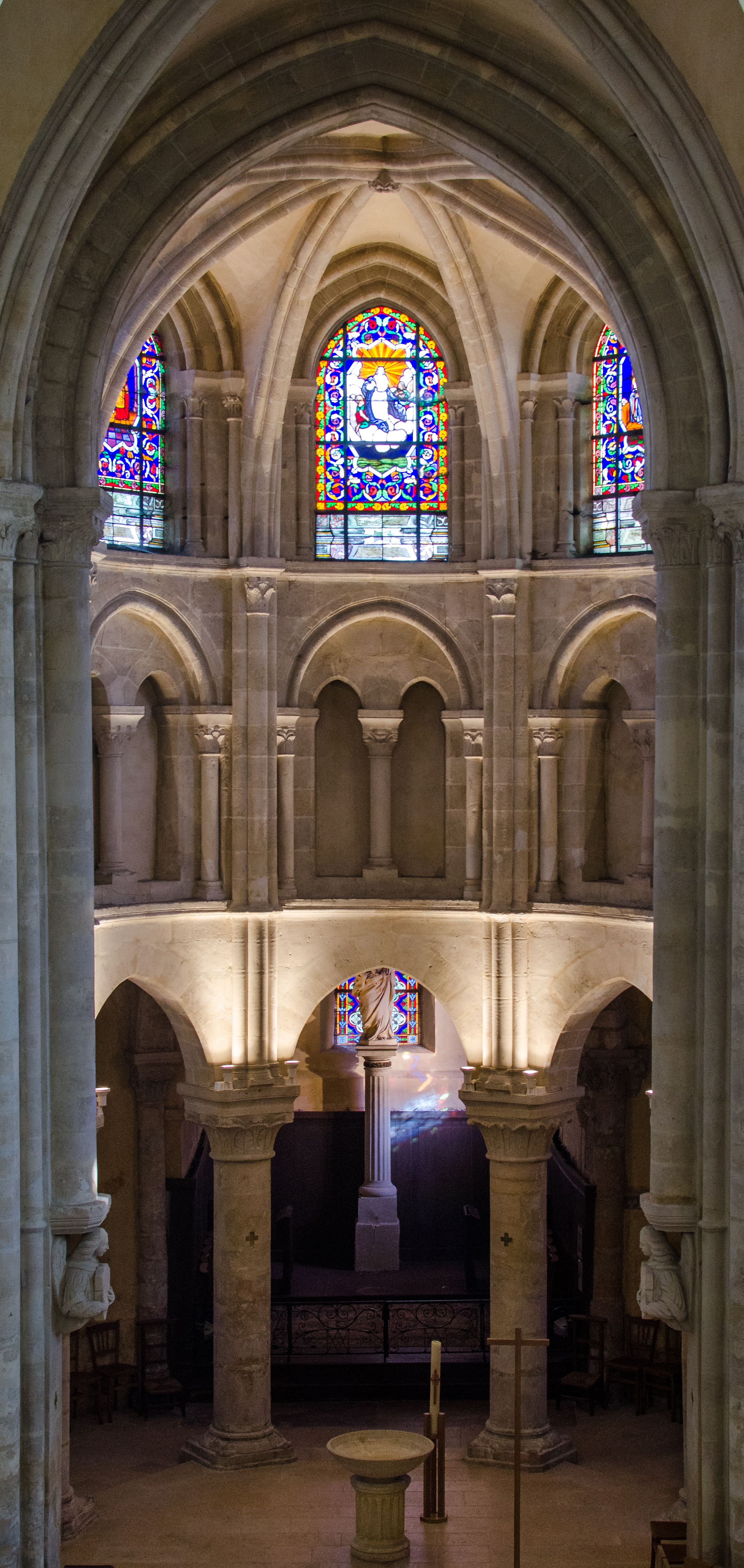 choeur de l'église de domont, vu de la tribune de l'orgue